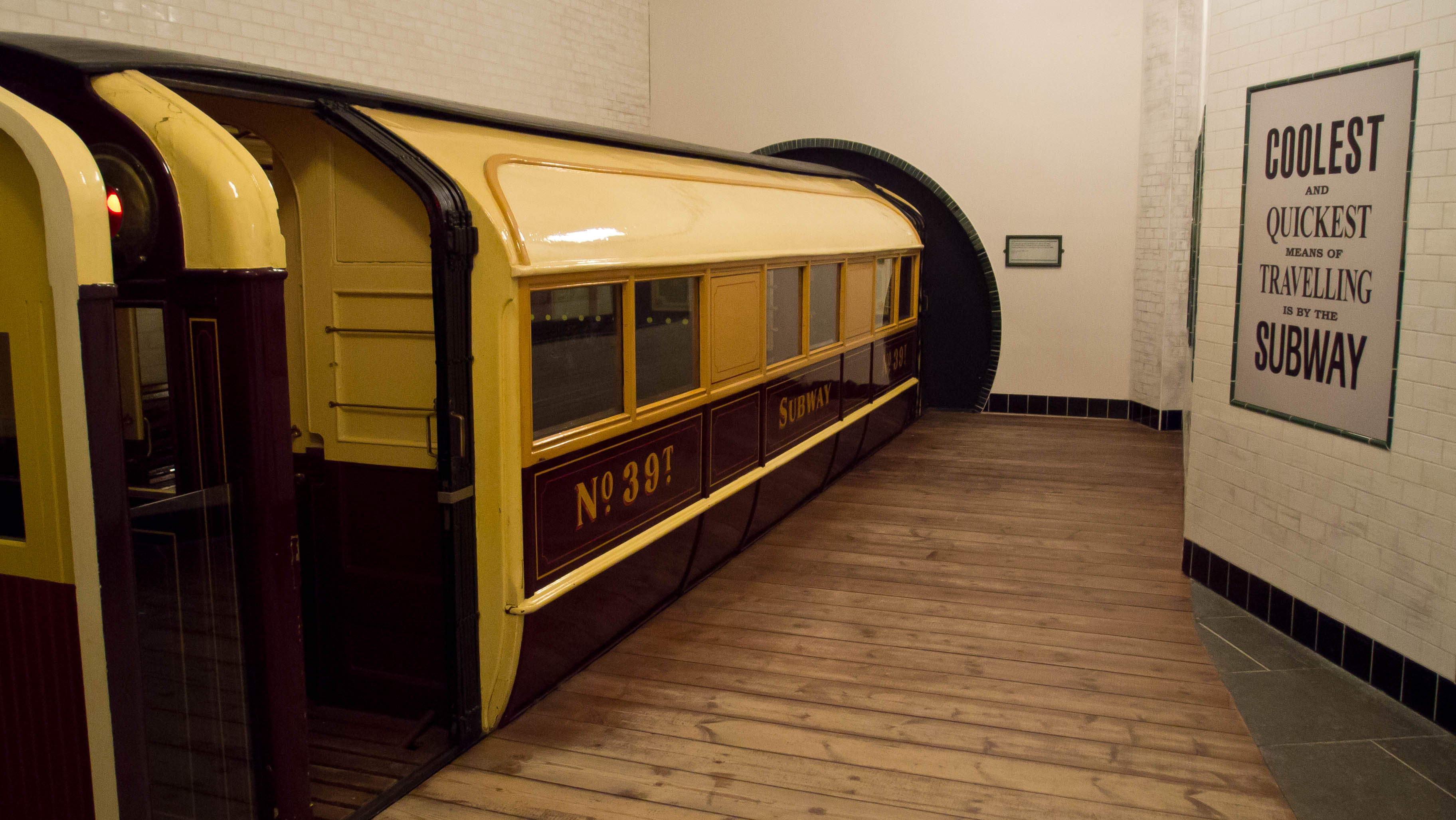 Riverside Museum, Glasgow